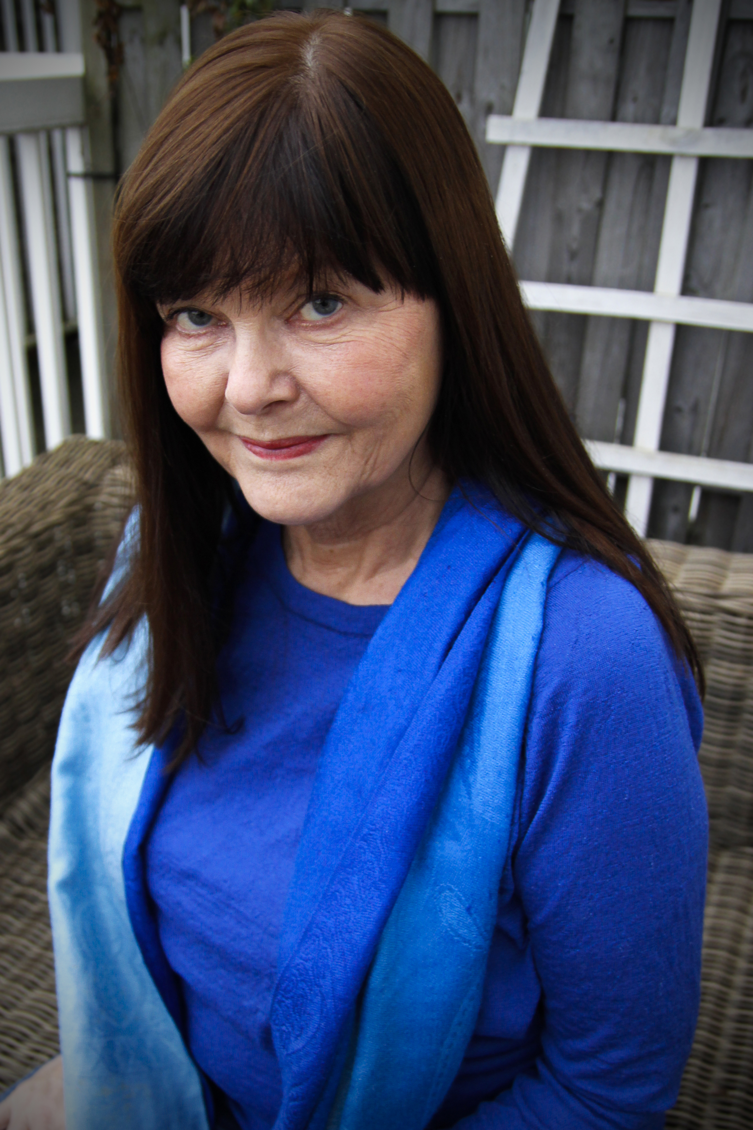 Författaren Eva Swedenmark.